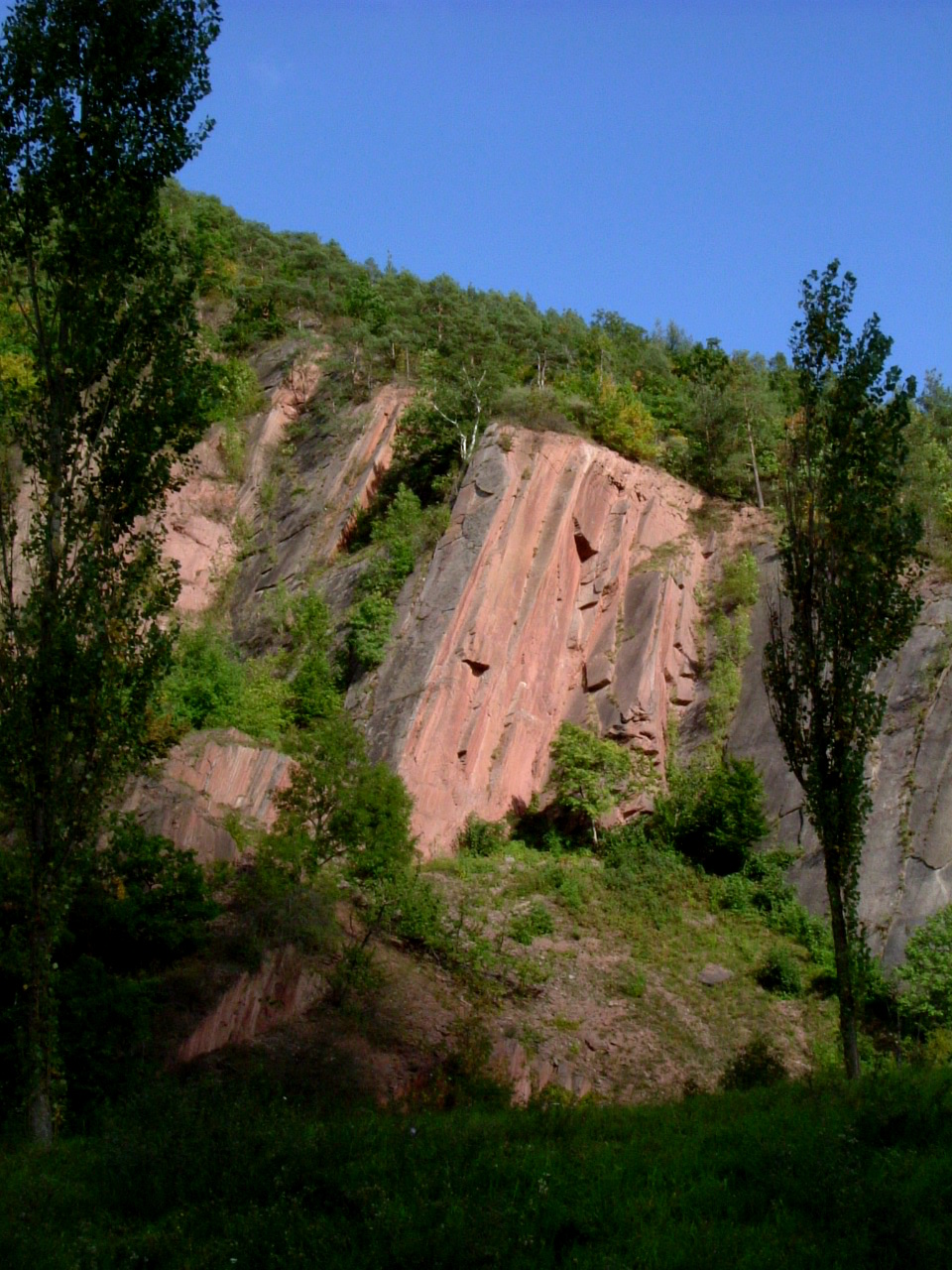 Nationales Geotop: Bohlenwand: Transgression von Zechstein (hell) über gefalteten devonischen Gesteinen; NSG Nr. 160 Bohlen WDPA ID 162484)